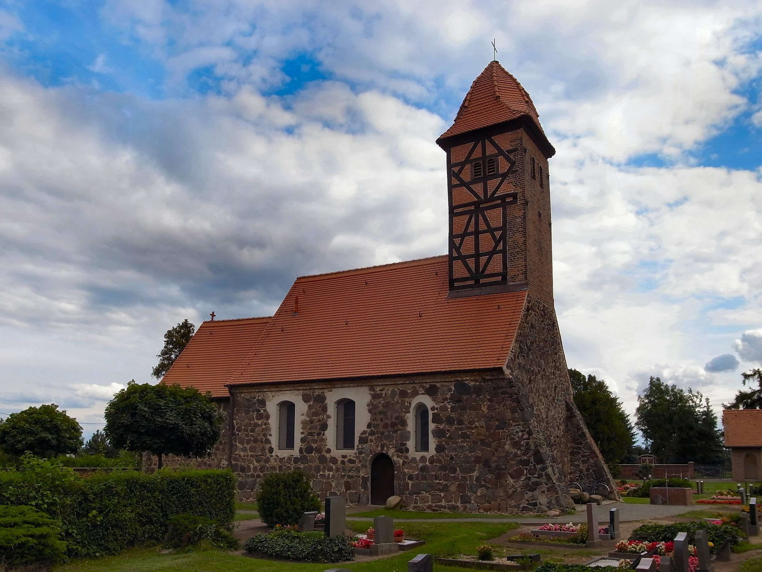 Evangelische Kirche zu Rodleben